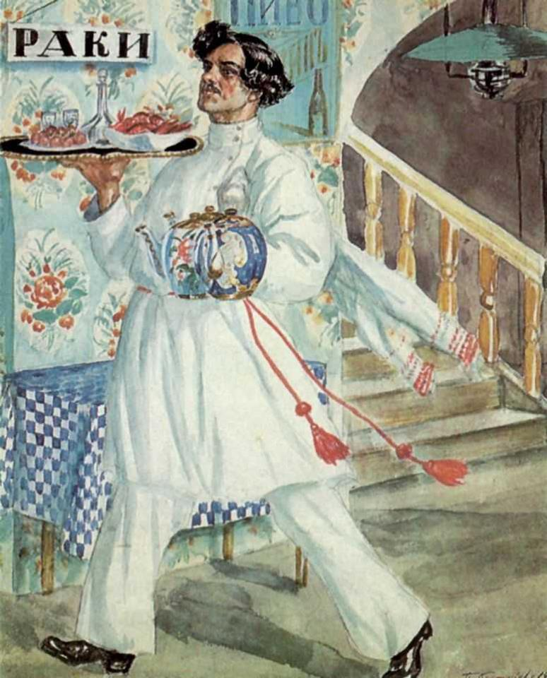 Б. М. Кустодиев. «Половой». 1920. Бумага, акварель, графит. 34 × 28. Музей-квартира И. И. Бродского, Санкт-Петербург.